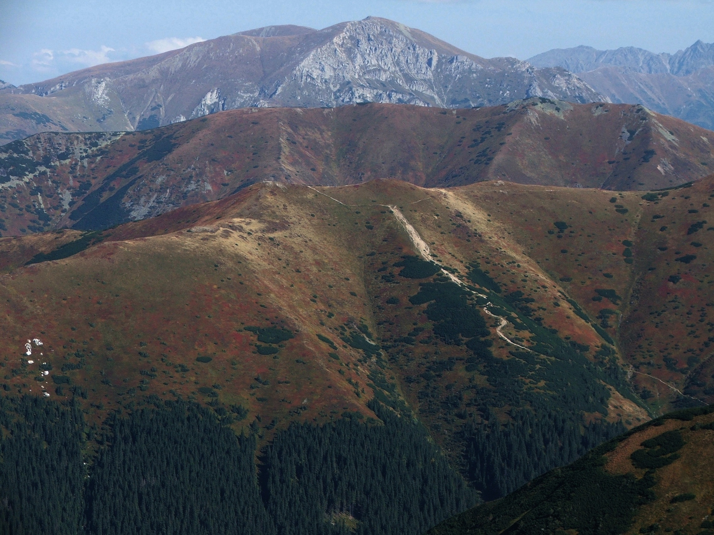 Widok z Długiego Upłazu